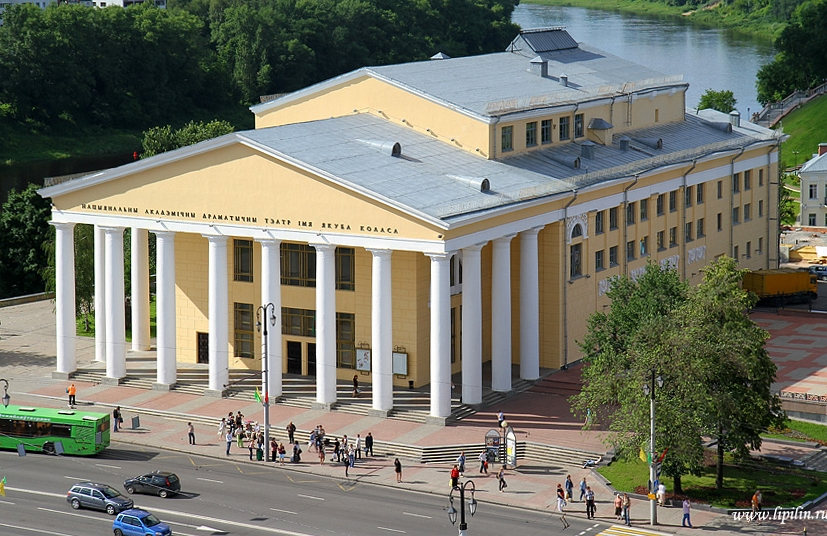 Віцебск. Тэатр імя Якуба Коласа